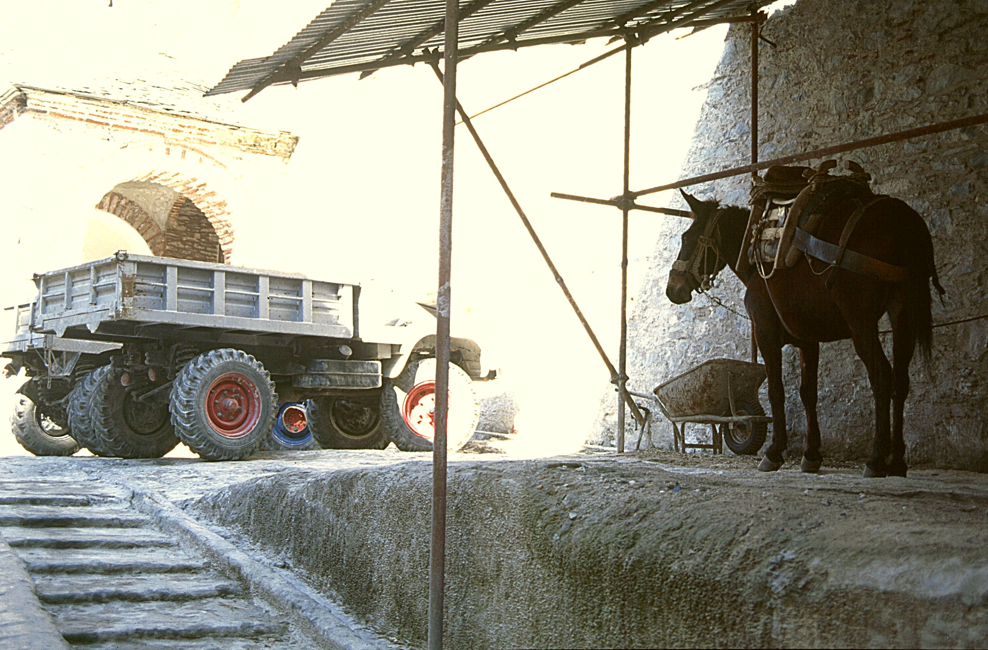 Moni Dionysiou (Athos), Arbeits"geräte"